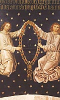 geschilderd Rouwbord 15e eeuw